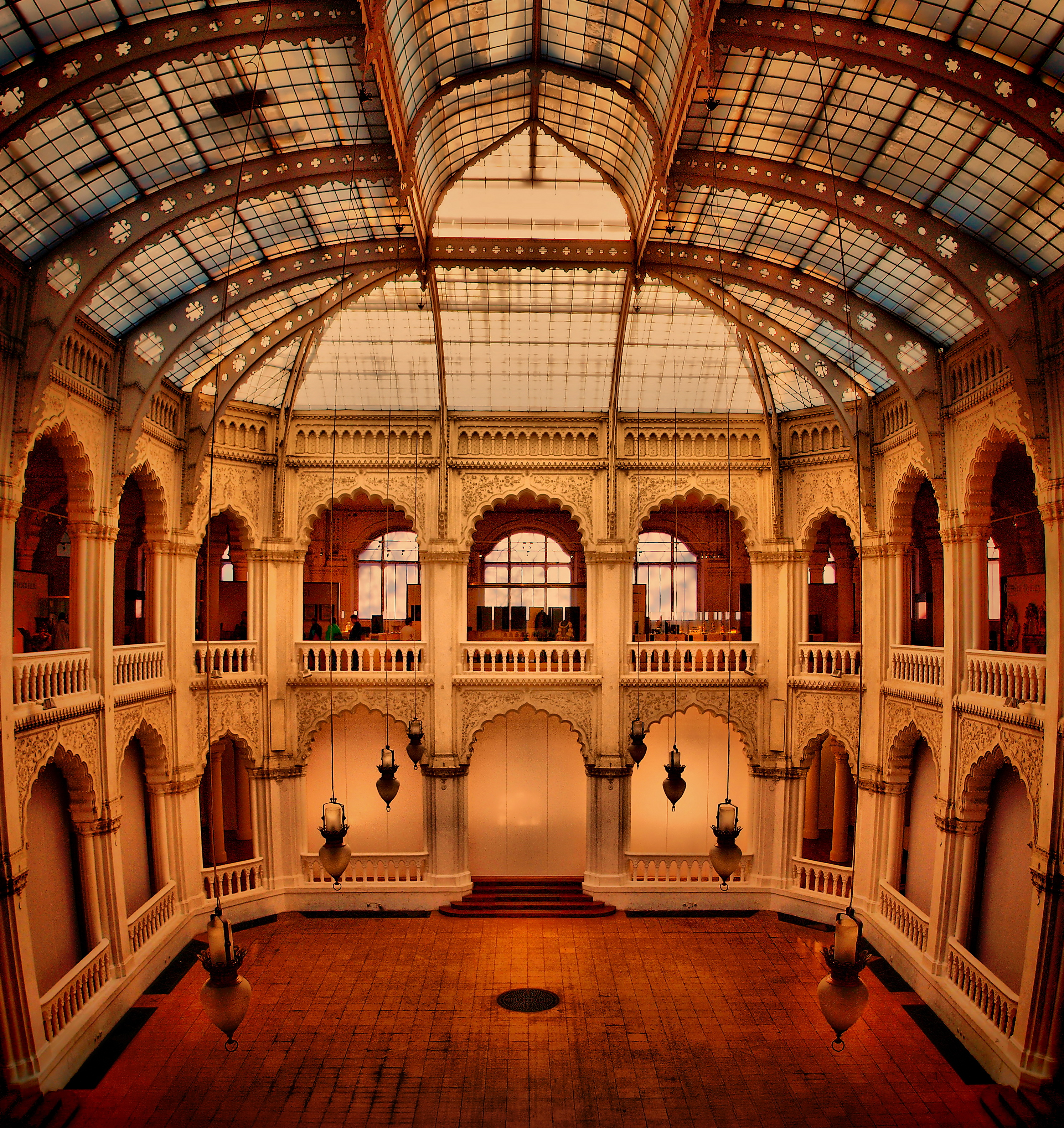 Iparművészeti Múzeum (Budapest 9, Üllői út 33-37., Hőgyes Endre utca 10-12., Kinizsi Pál utca 31.) This is a photo of a monument in Hungary. Identifier: 1070